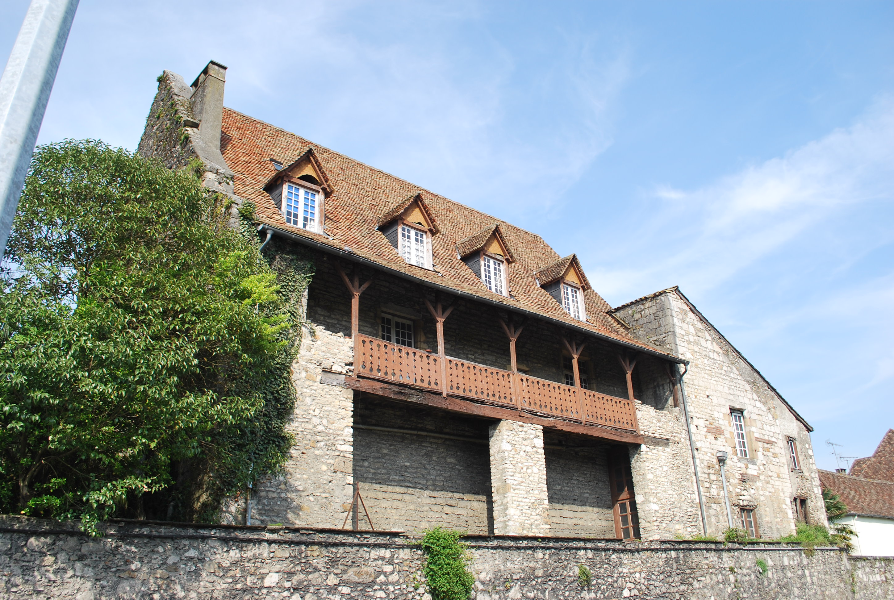 Maison Batcave, en face de la salle de la Moutete à Orthez (Pyrénées-Atlantiques).